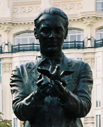 Closeup cutout from Image:Garcialorca madrid lou.jpg